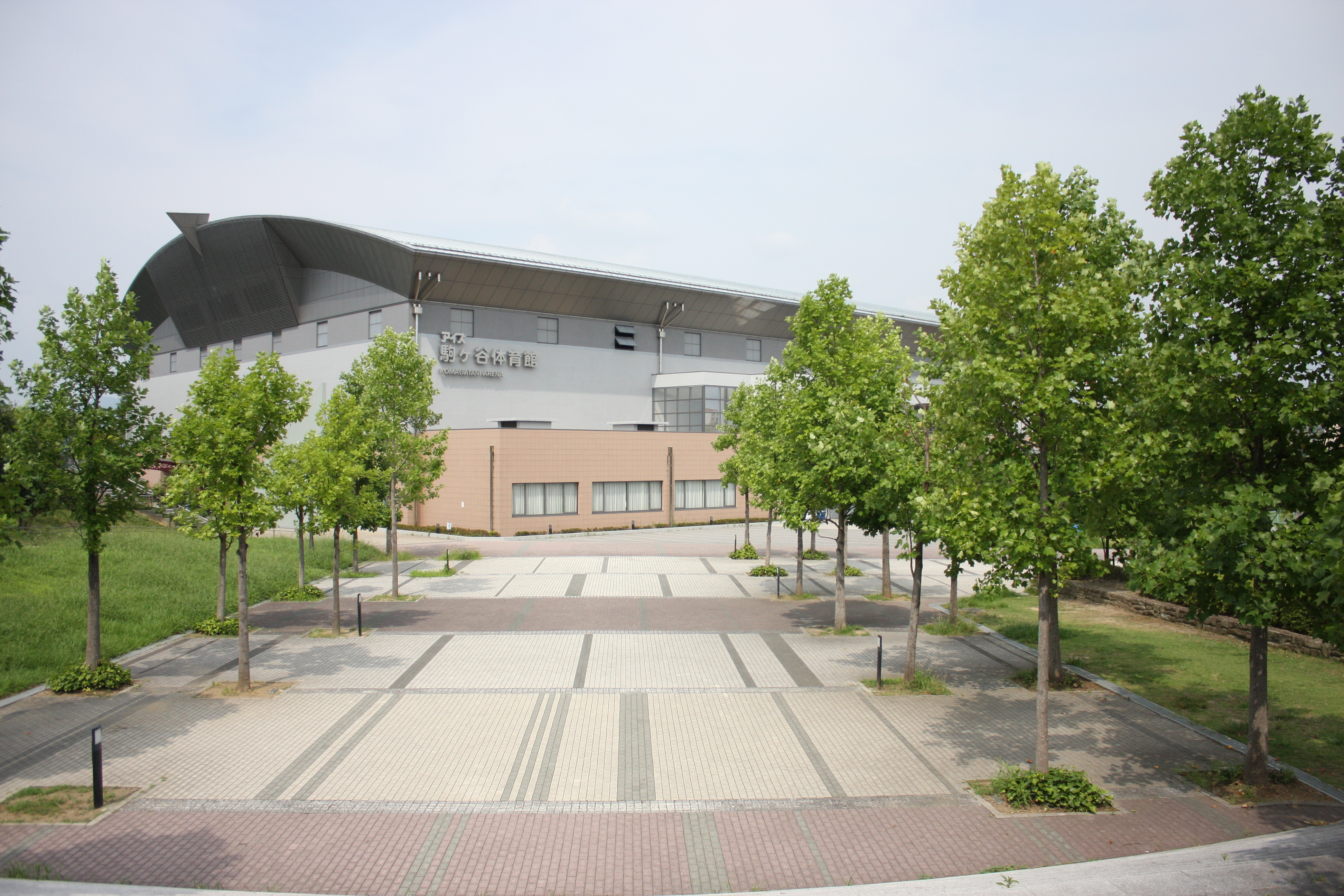 駒ヶ谷体育館